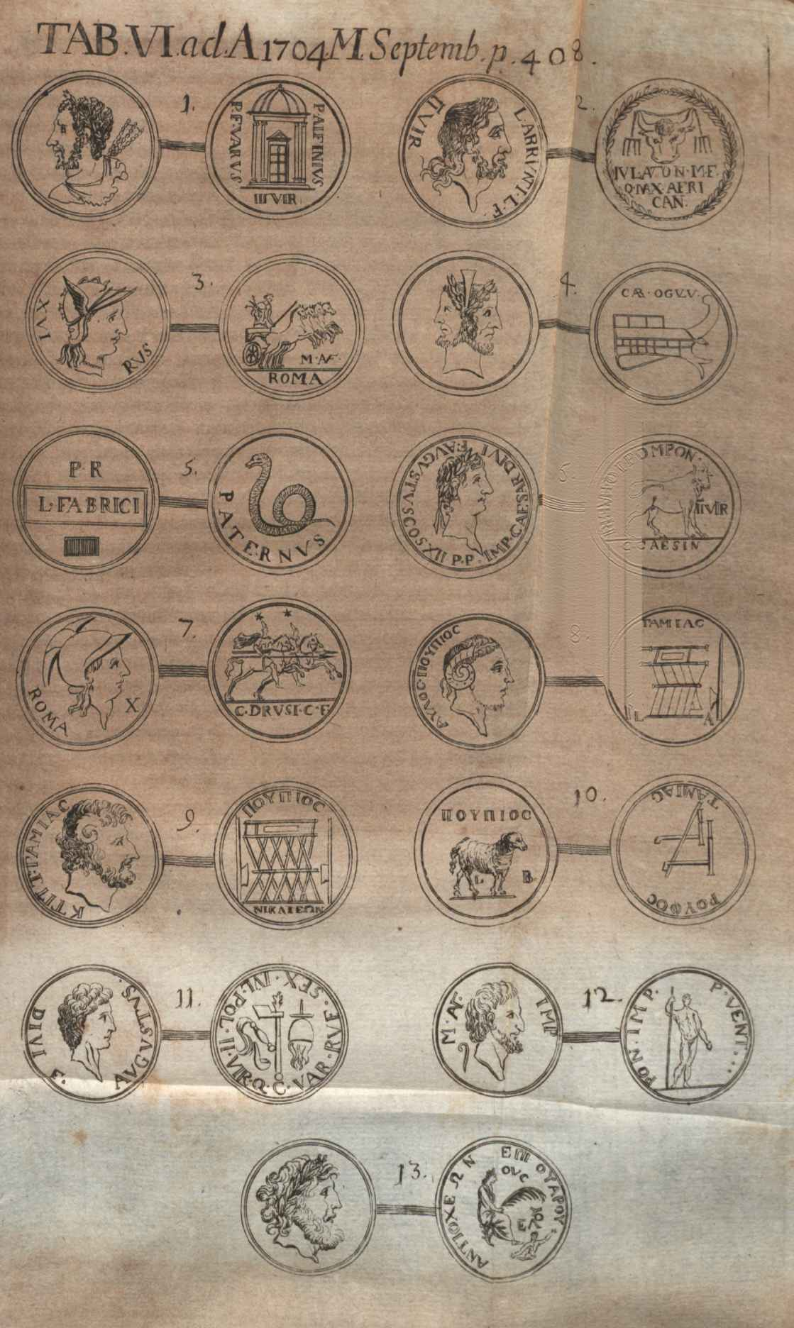 Illustration